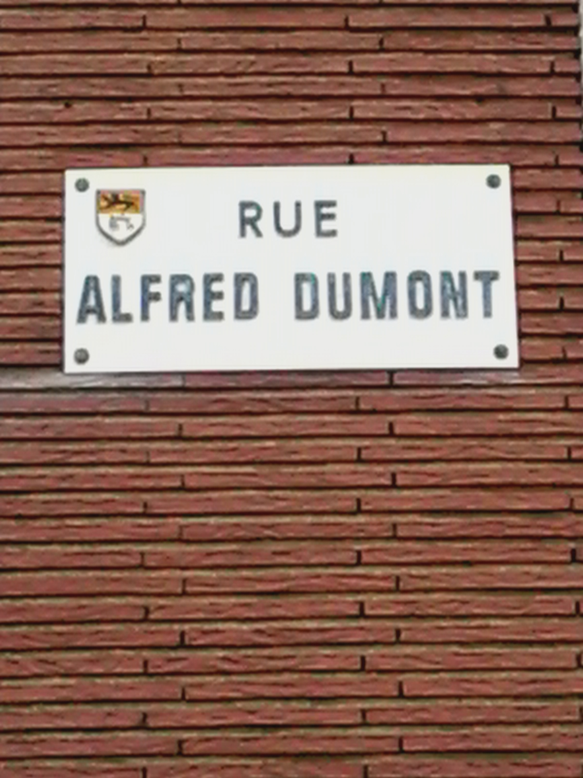 Plaque de rue Alfred Dumont à Dunkerque